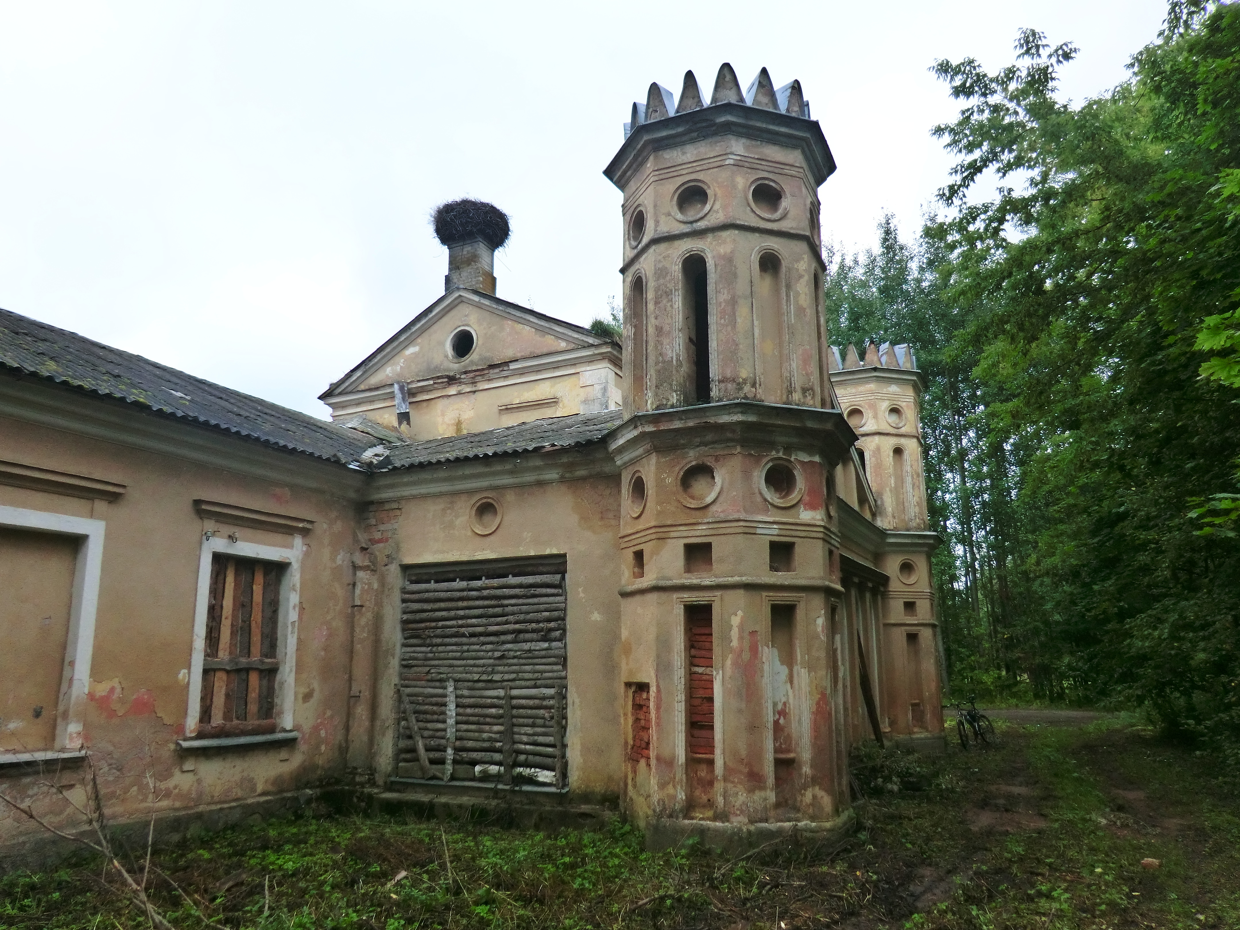 Заброшенная усадьба, Панемунис